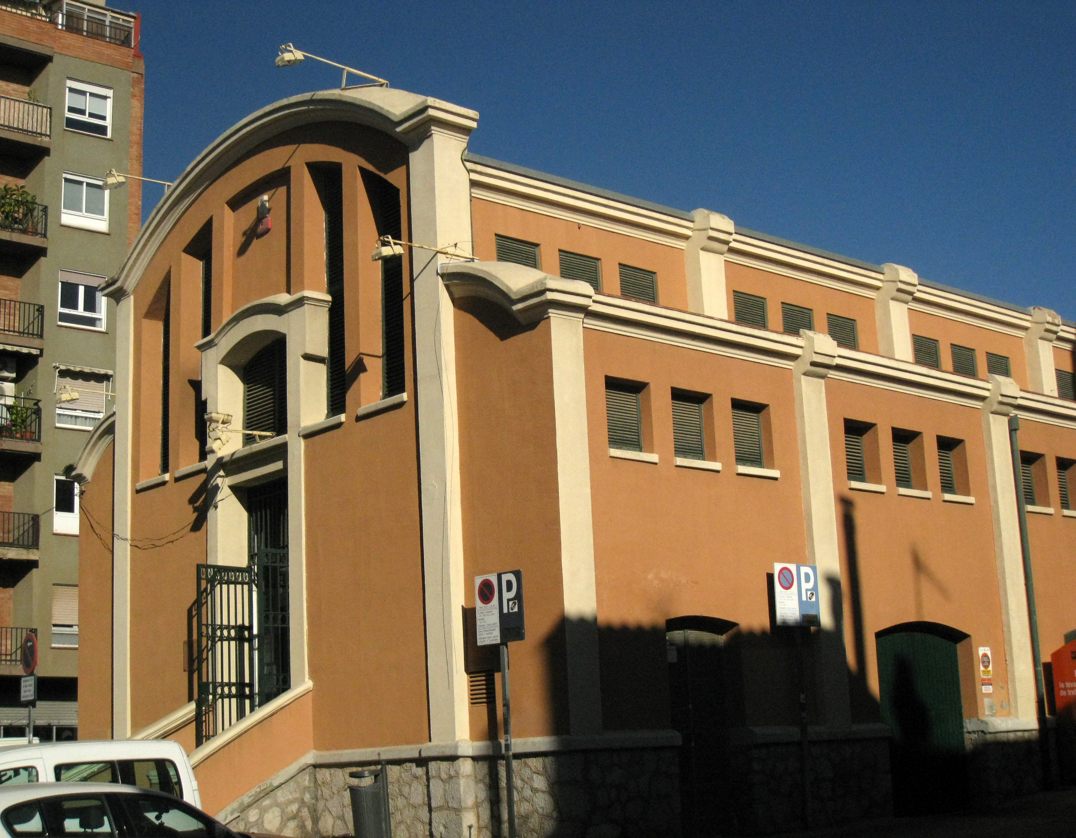 Mercat del Triomf (Terrassa), al barri de Sant Pere. Obra de Melcior Viñals de 1928.